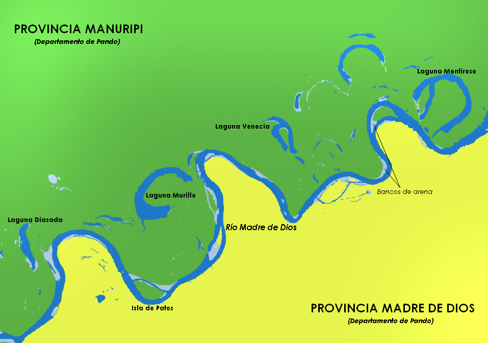 Mapa del río Madre de Dios a su paso por las lagunas Murillo, Vencecia, Mentiroso, etc. entre las provincias de Manuripi y Madre de Dios en el departamento de Pando (Bolivia).